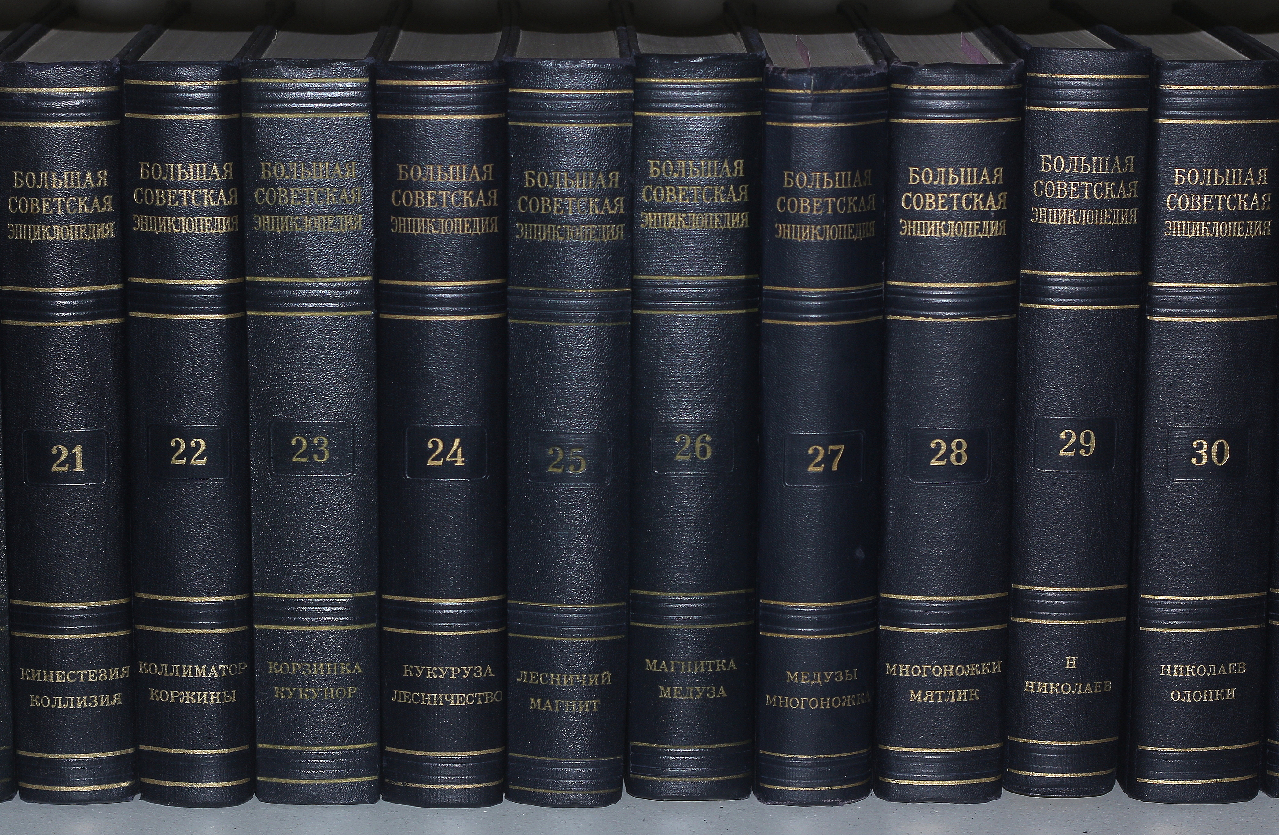 Большая советская энциклопедия второе издание. 21 - 30 тома на полке.